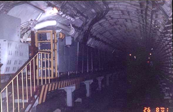 Служебная платформа в тоннеле линии Д6 метрополитена Москвы